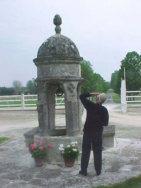 Caillaud, waterput